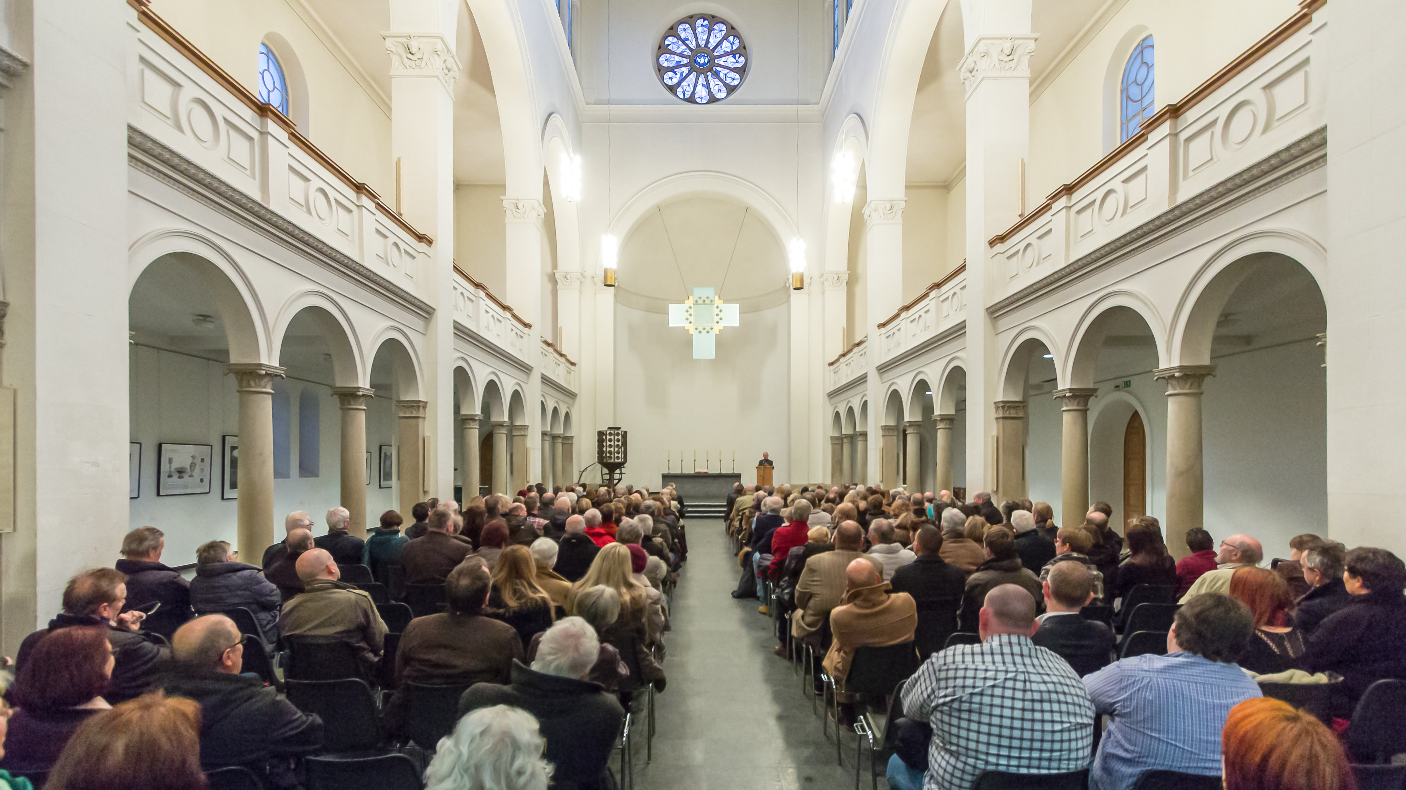 Ausstellungseröffnung „Willkommen im alten Köln“ im Historischen Archiv der Stadt Köln in der Trinitatiskirche Köln Foto: Blick durch das Hauptschiff der Trinitatiskirche in Richtung Altar